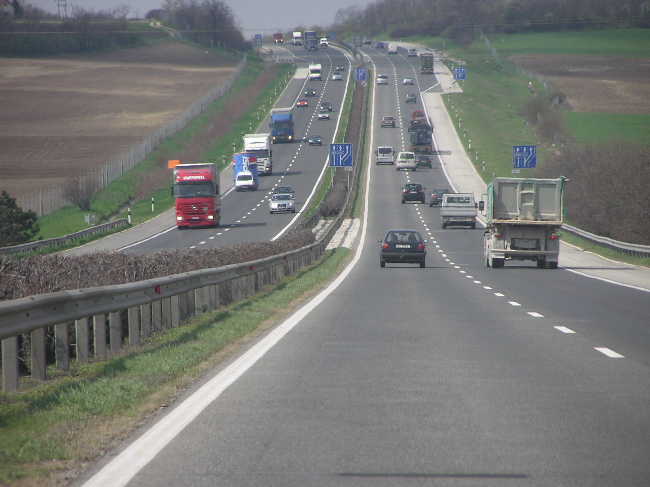 Die Autobahn M1 nach Budapest in Richtung Wien.